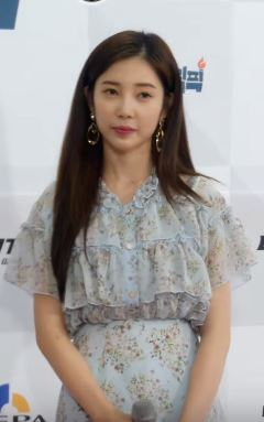 17일 오전 서울시 마포구 상암동 에스플렉스에서 OGN '게임돌림픽 2109 : 골든카드' 레드카펫 행사가 열려 에이프릴(APRIL) 예나, 레이첼, 채경이 참석해 포토타임과 헤머게임을 진행했다.